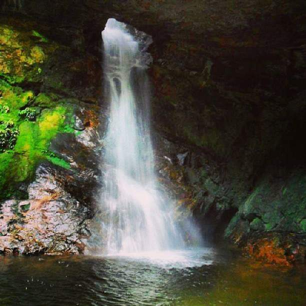 El ojo de Dios en la reserva natural el fin del mundo para los amantes de caminatas ecológicas. Es un gran esfuerzo una caminata de unos 90 min desde donde el carro nos dejó. senderos para realmente especialistas no apto para tercera edad. Esta fotografía fue tomada en un área protegida de Colombia con el código 858 del RUNAP.